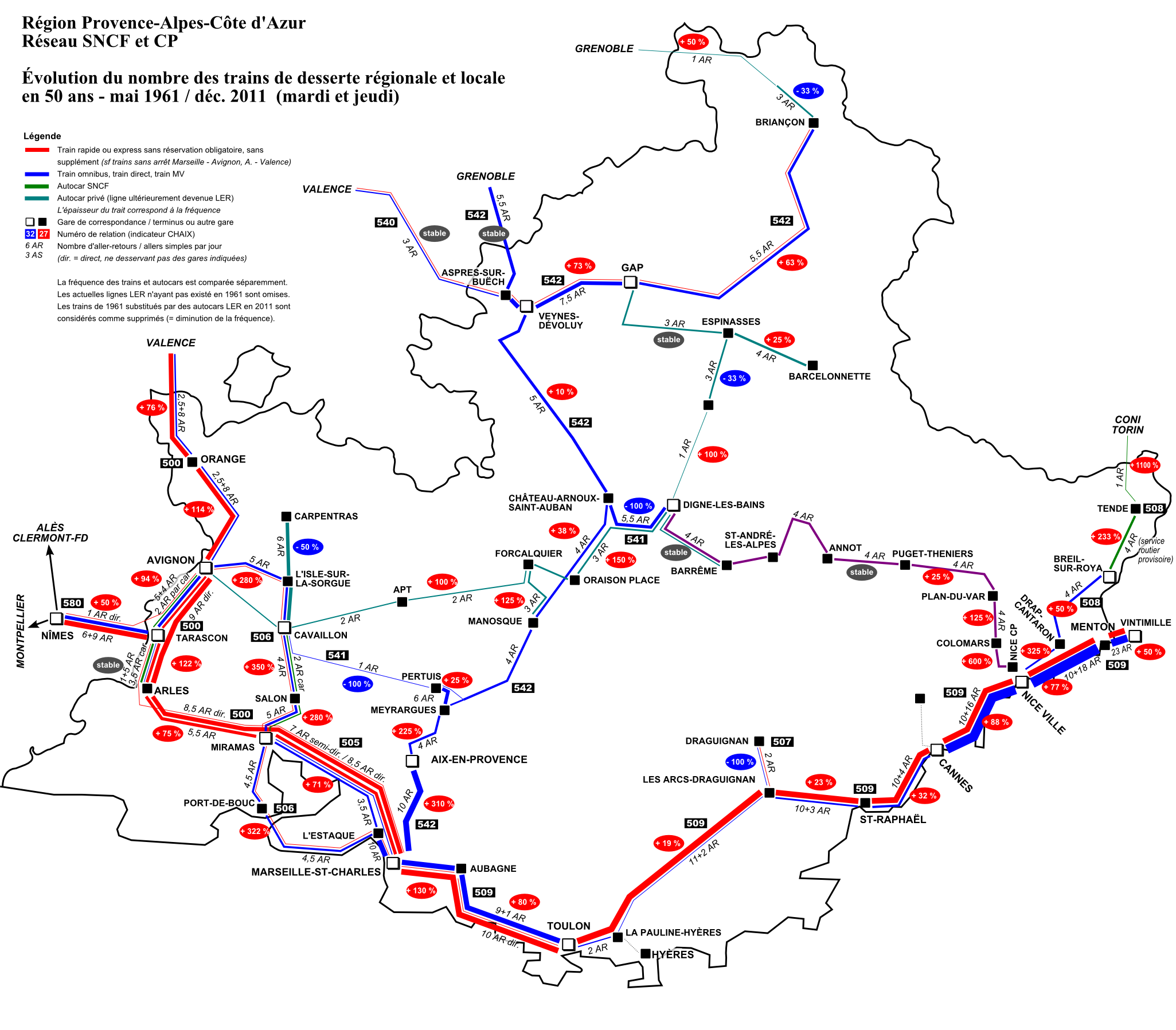 Provence-Alpes-Côte d'Azur, évolution du nombre des trains de desserte régionale et locale en 50 ans - mai 1961 à décembre 2011 (comparaison des omnibus, trains directs, trains MV, express et rapides sans réservation et sans supplément en 1961 avec les TER et Intercités sans réservation obligatoire en 2011). Les trains saisonniers circulant seulement de fin juin à début ou fin septembre ne sont pas pris en compte. Trains et autocars sont comparés séparemment.